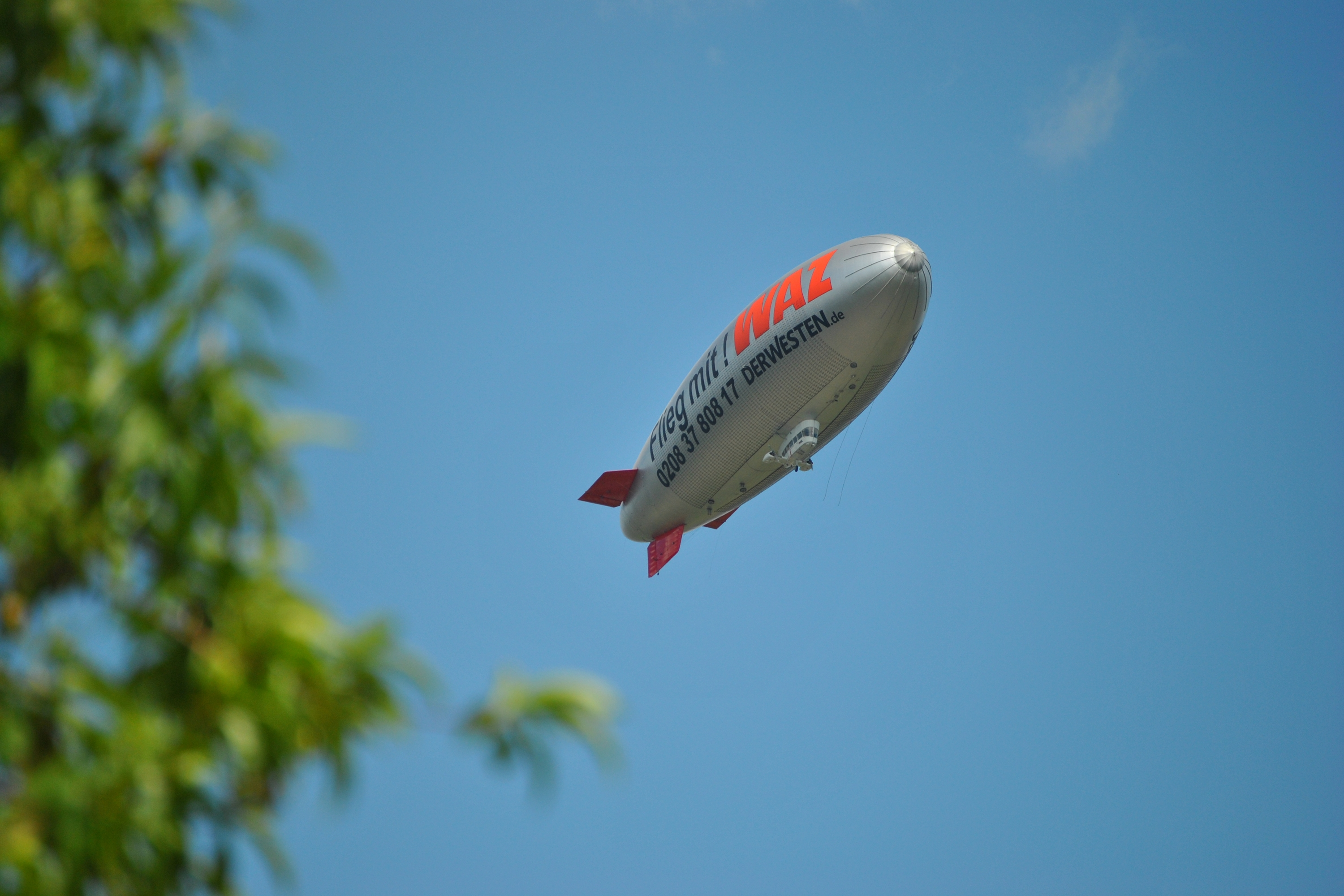 Das WDL-Luftschiff D-LDFR bei einer Werbetour für die WAZ über Moers